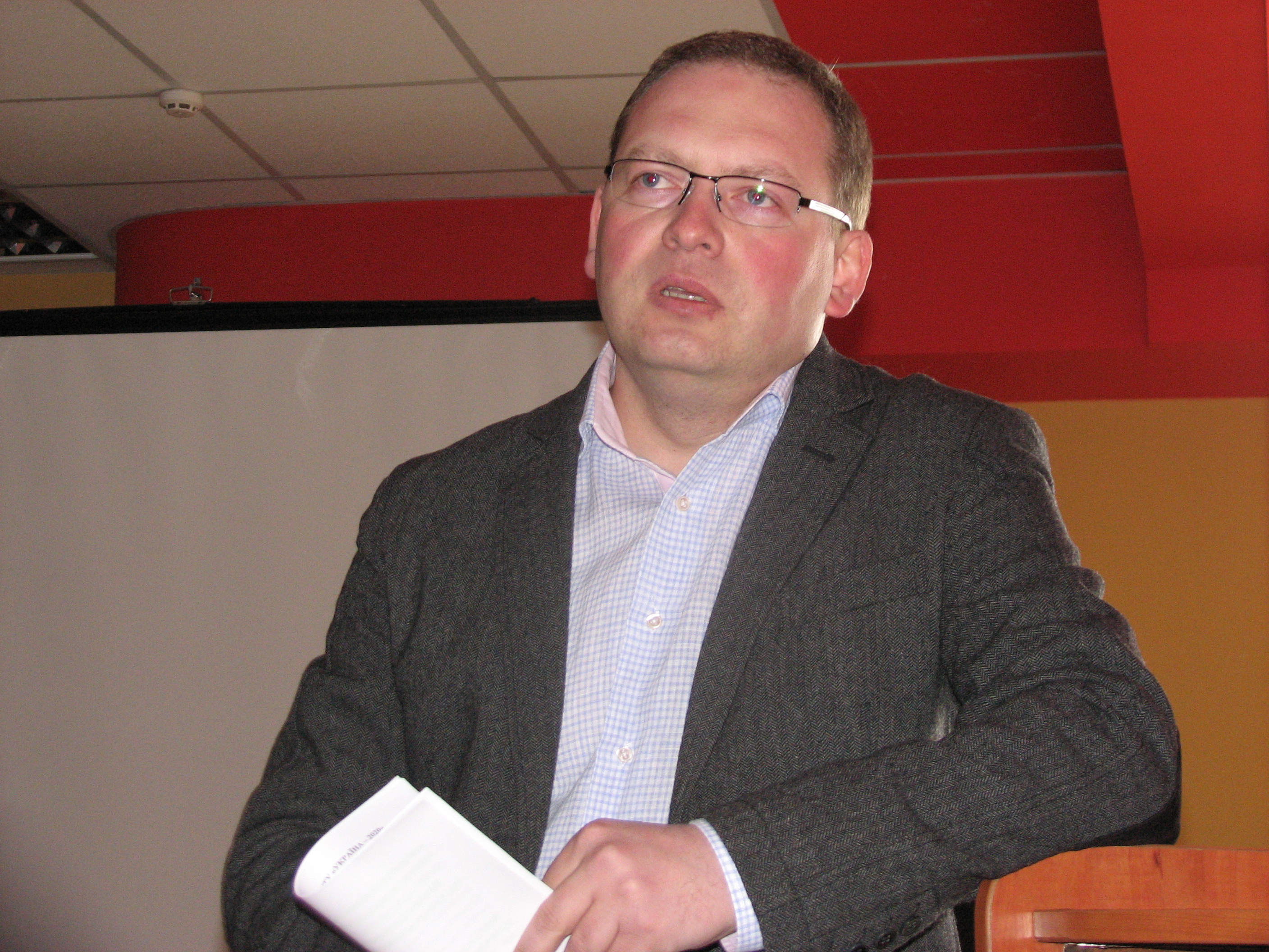 Іван Монолатійчитає лекції у Відкритому університеті Івано-франківська